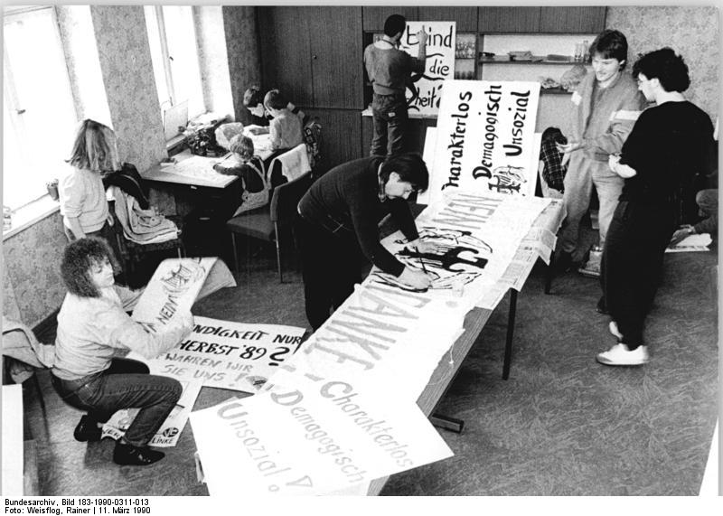 ADN-ZB Weisflog Le 11.3.1990 Le Cottbus: Wahlkampf. Die Mitarbeiter der "Vereinigten Linken" und der "Nelken" bestreiten den Wahlkampf ohne Hilfe aus der BRD oder anderer Staaten. Zur Zeit organisieren sie eine Gegendemonstration zum bevorstehenden Wahkampfbesuch des BRD-Bundeskanzlers Helmut Kohl."